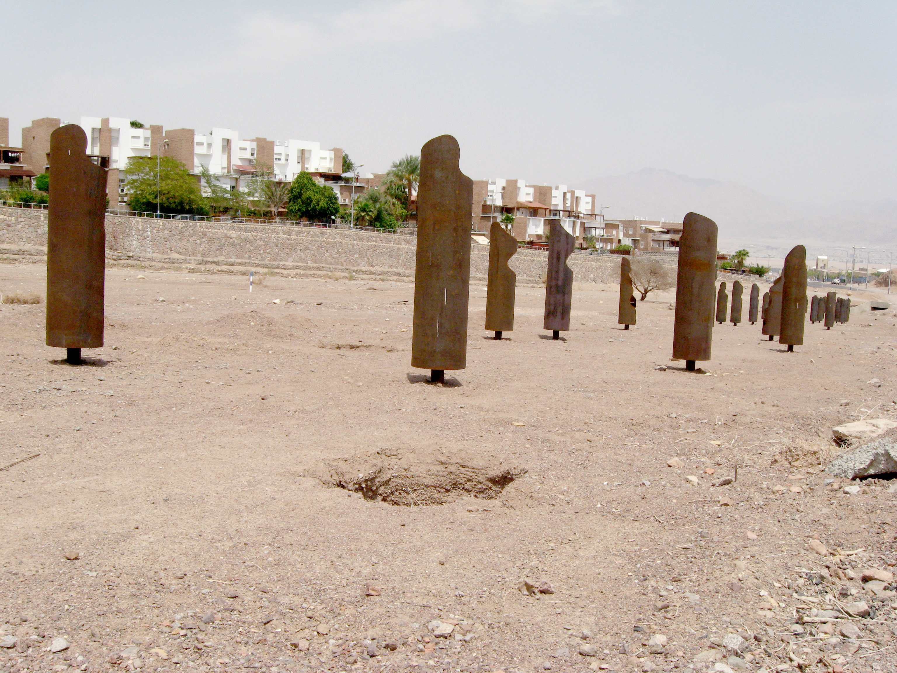 פסלים המדמים את הדרך ההסטורית בדרב אל-חג'